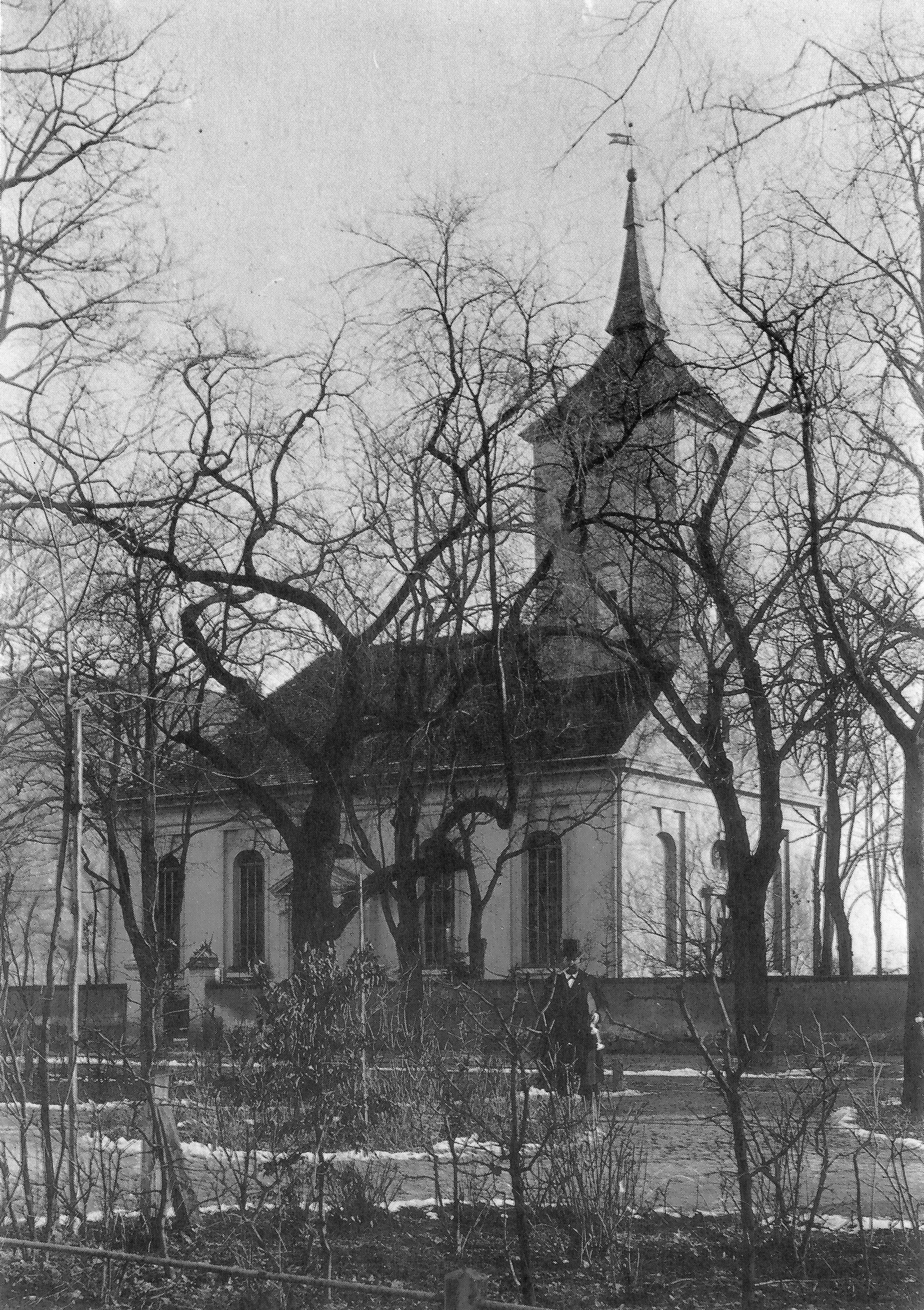 fotografiertes historisches Foto